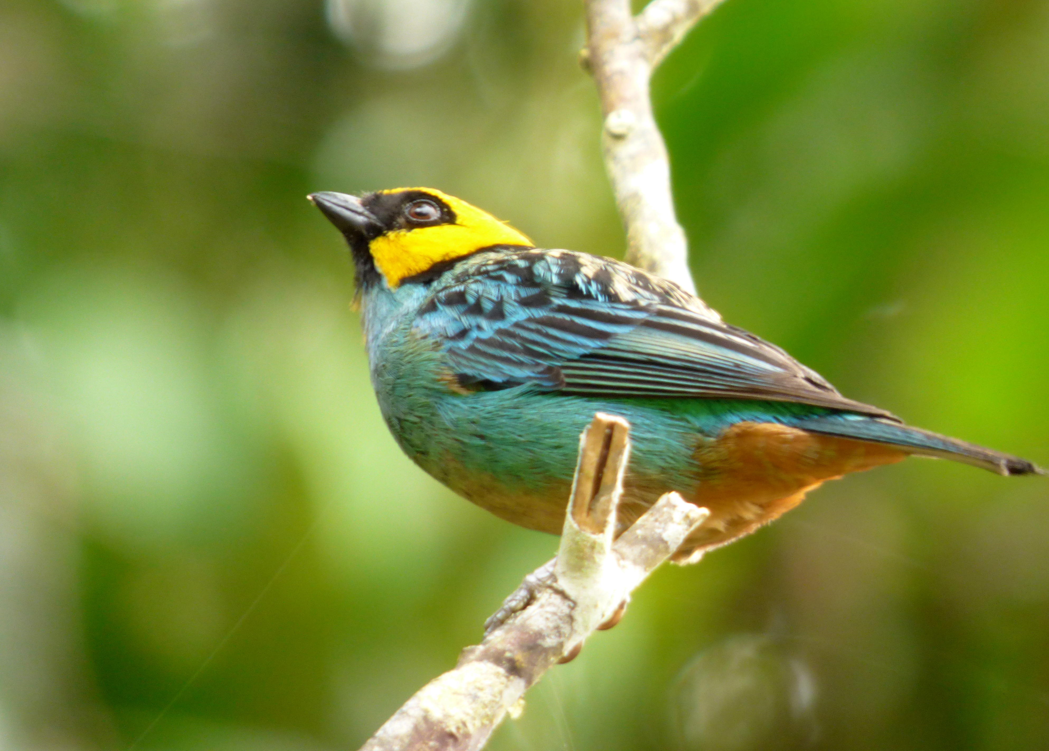 Tangara xanthocephala (Tángara coronada)